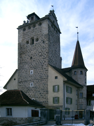 Schloss Aarwangen, Blick auf den Eingang